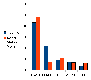 Alegerile 1994